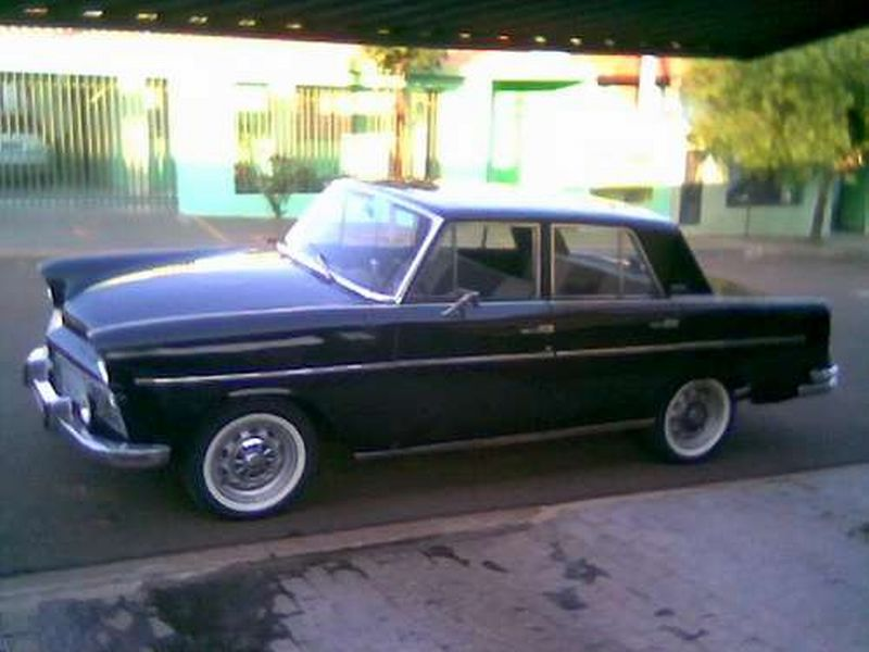 (portuguese) Automóvel Aero Willys Itamaraty, ano 1962, fabricação brasileira